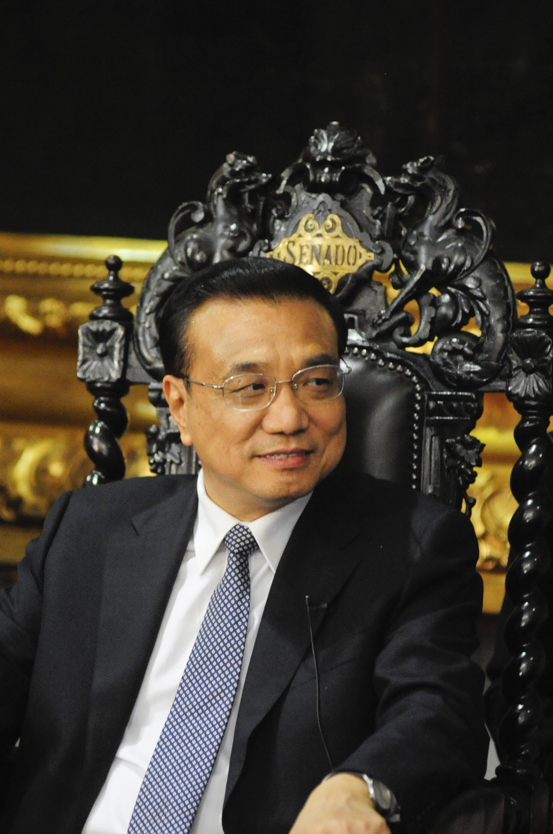 O presidente do Congresso Nacional, senador Renan Calheiros (PMDB-AL) recebe o primeiro-ministro da República Popular da China, Li Keqiang, em visita oficial ao Brasil, acompanhado de uma comitiva de 17 pessoas. Em destaque, primeiro-ministro da República Popular da China, Li Keqiang. Foto: Marcos Oliveira/Agência Senado